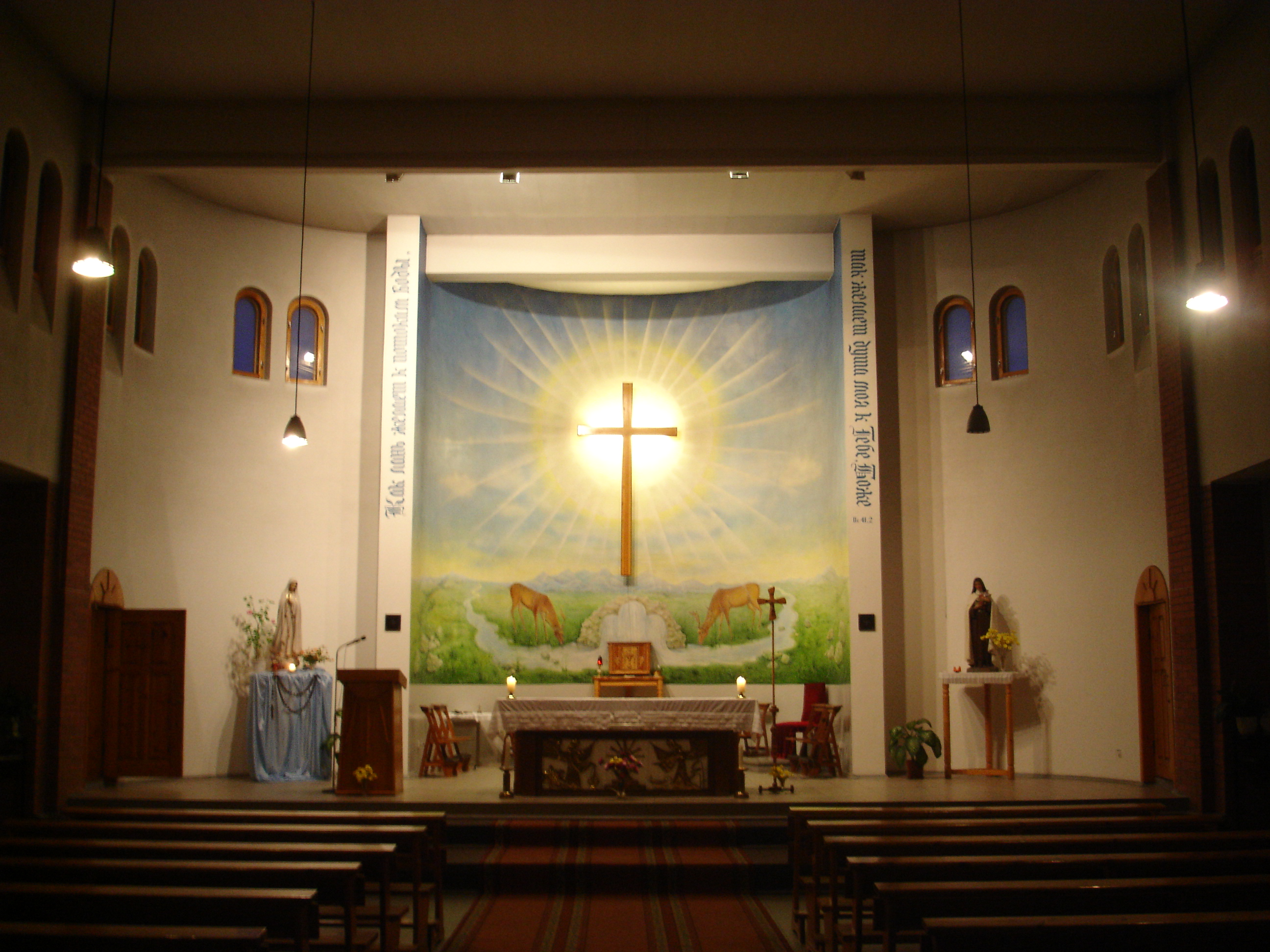 Римо-католическая церковь Святой Терезы Младенца Иисуса, Павлодар. Казахстан. Вид на алтарную часть церковного зала.